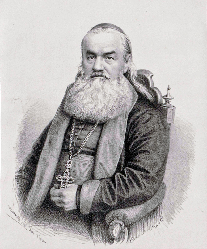 Епископ Арадский Прокопий (Ивачкович) в 1866 году